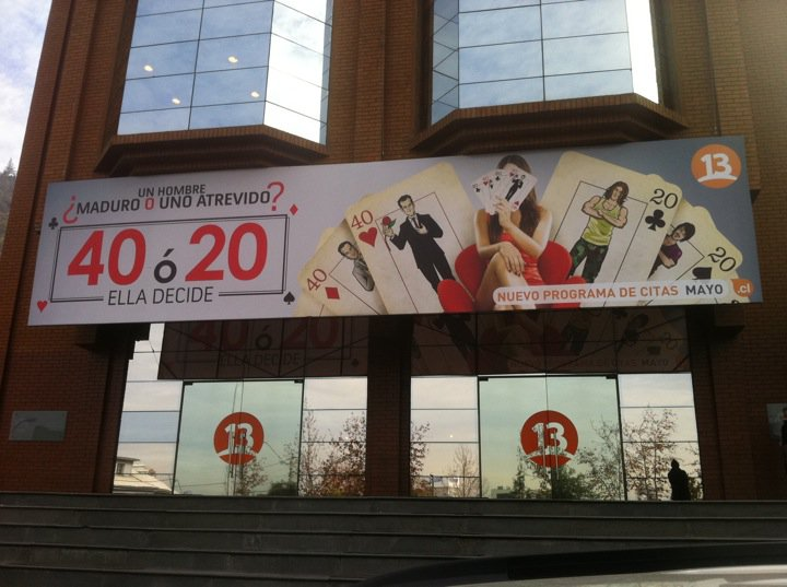 La fachada de Canal 13 exhibiendo una gigantografía de su reality show 40 o 20 en junio de 2011. Inés Matte Urrejola 0848, Providencia, Santiago de Chile.